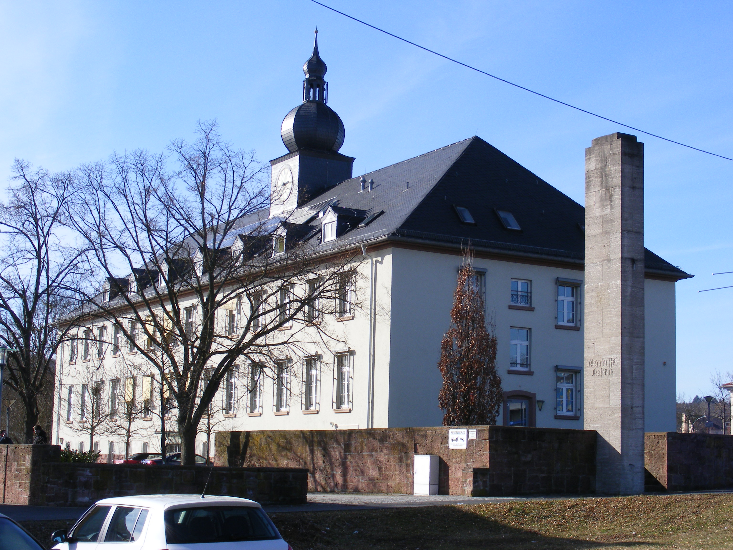 Bad Kissingen - ehem. Kasernengebäude mit Uhrenturm Nutzungen Manteuffel-Kaserne (Wehrmacht, Kraftradschützenbataillon 2) 1937 - 1945 [1] International Refugee Organization (USA) 1948 - 1951 [2] Daley Barracks (U.S. Army, verschiedene Einheiten) [3] [4]) 1951 - 1995 1995 bis 2005 Wohnanlage der U.S. Army (Housing area) der U.S. Army für die Garnison Schweinfurt